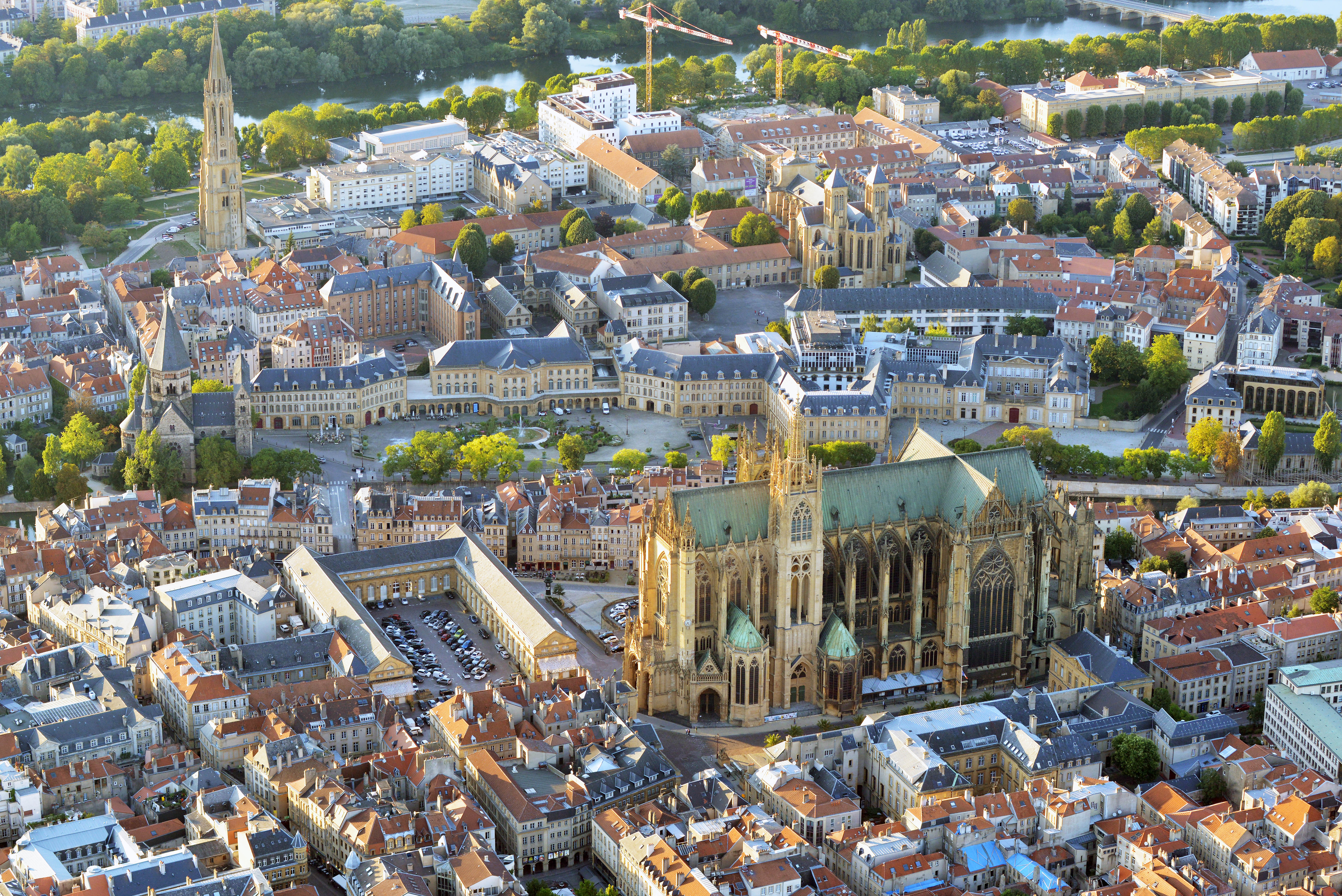 Stadtzentrum Metz